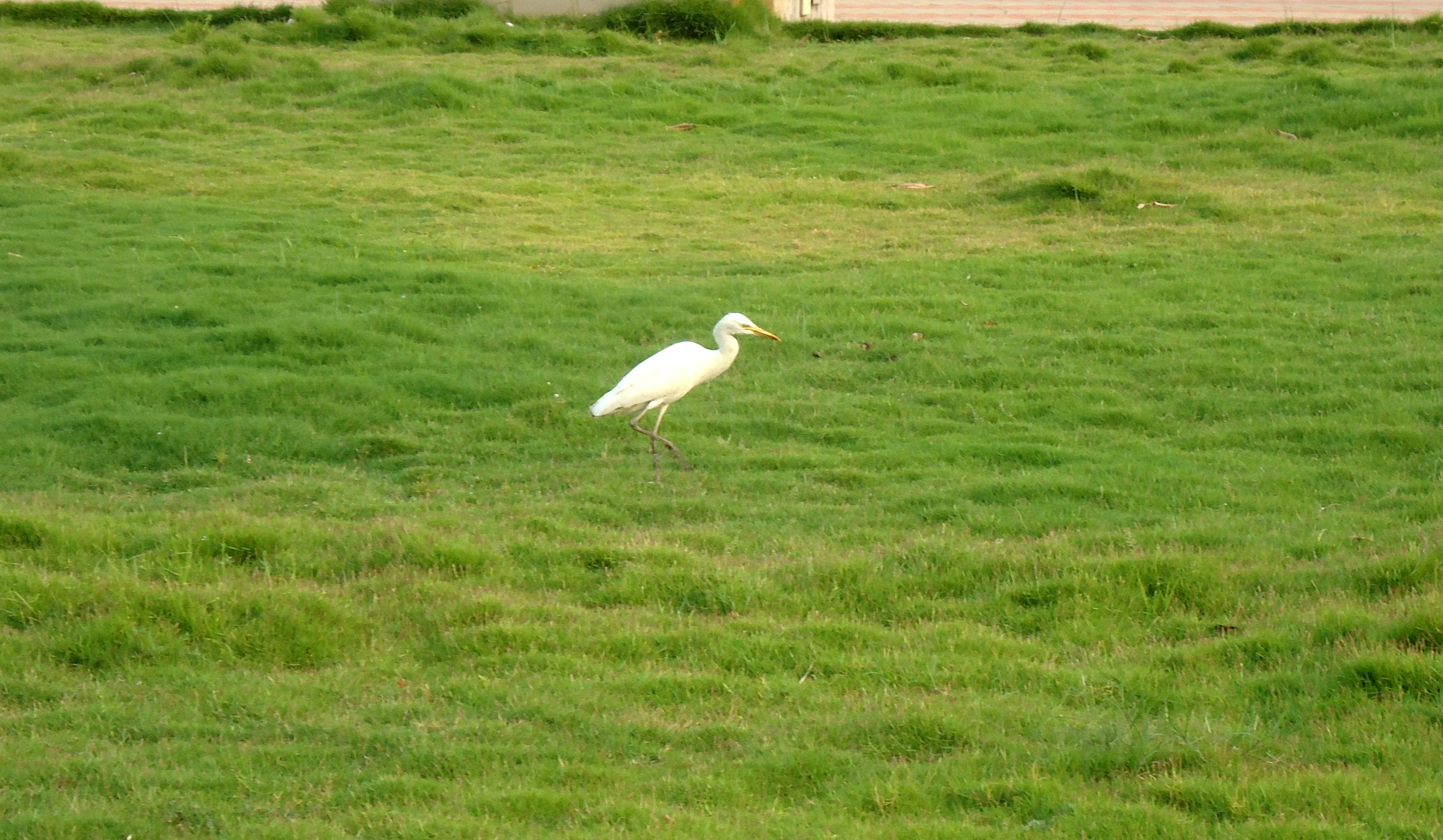 Egret At Malampuzha Garden.